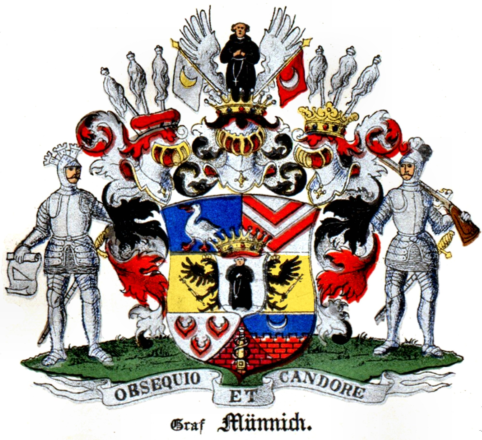 Герб рода графов Минихов